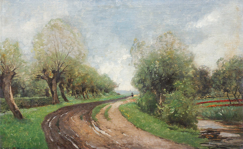 Weg in Neuengamme. Öl auf Leinwand, 37 x 58 cm, signiert A. Lutteroth, verso handschriftlich betitelt sowie 1898 datiert.